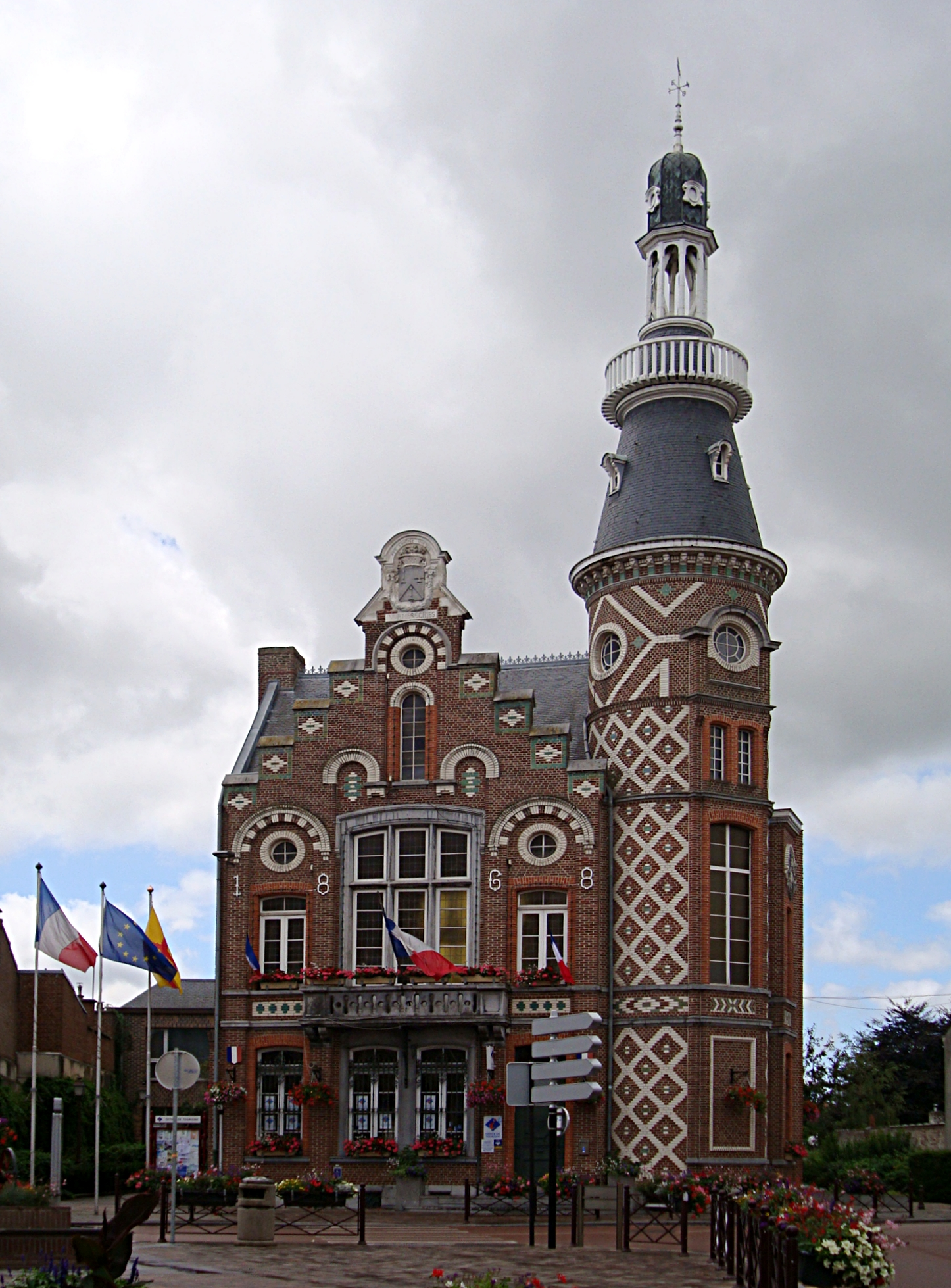 L'hôtel de ville de Wambrechies (Nord). Style Renaissance flamande XIXe siècle. Architecte : Charles Maillard.